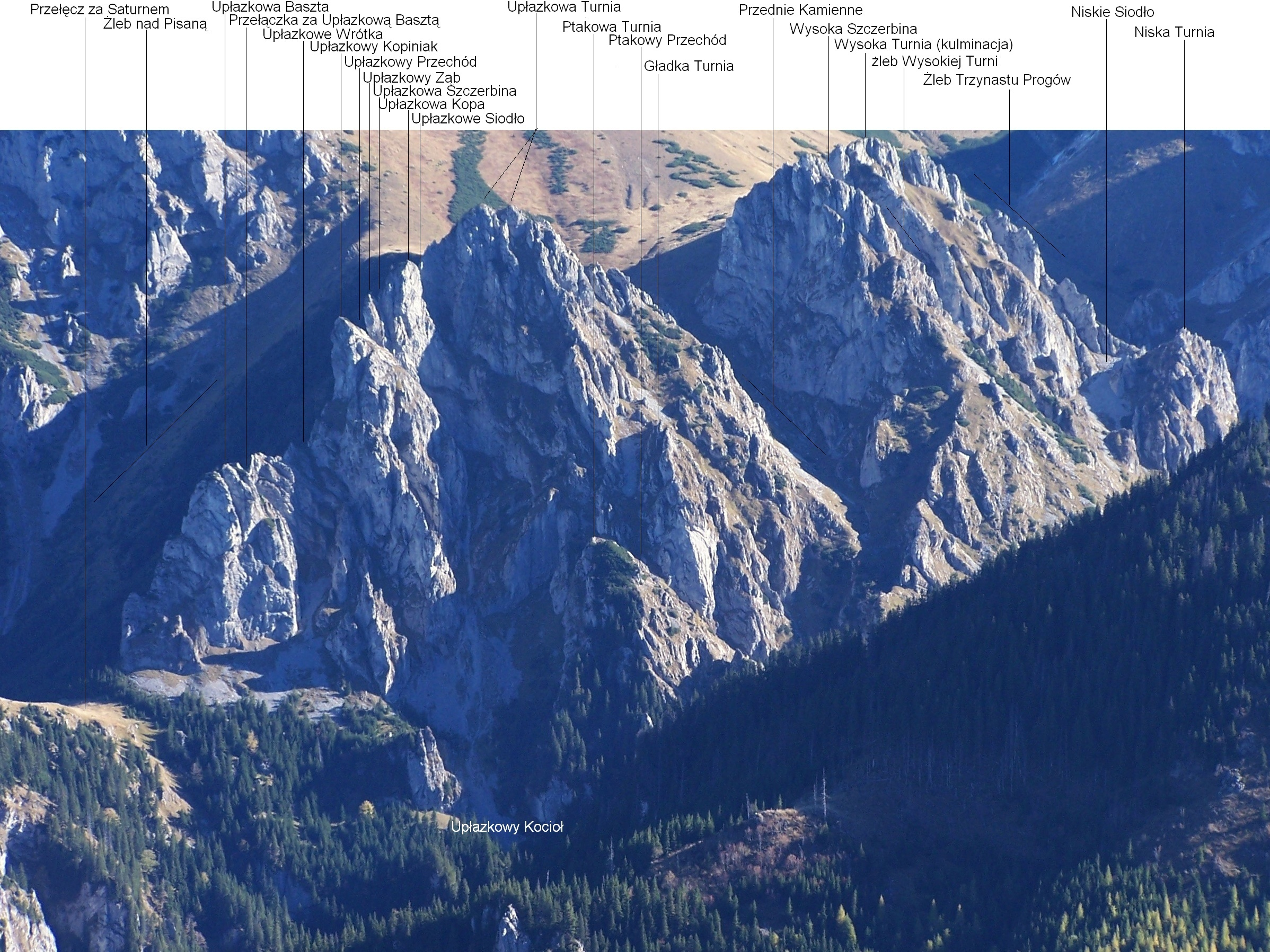 Widok z Ornaku na Upłazkową Turnię i Wysoką Turnię w Wąwozie Kraków